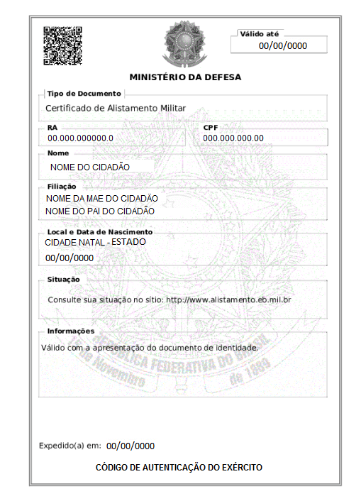 Modelo de CAM